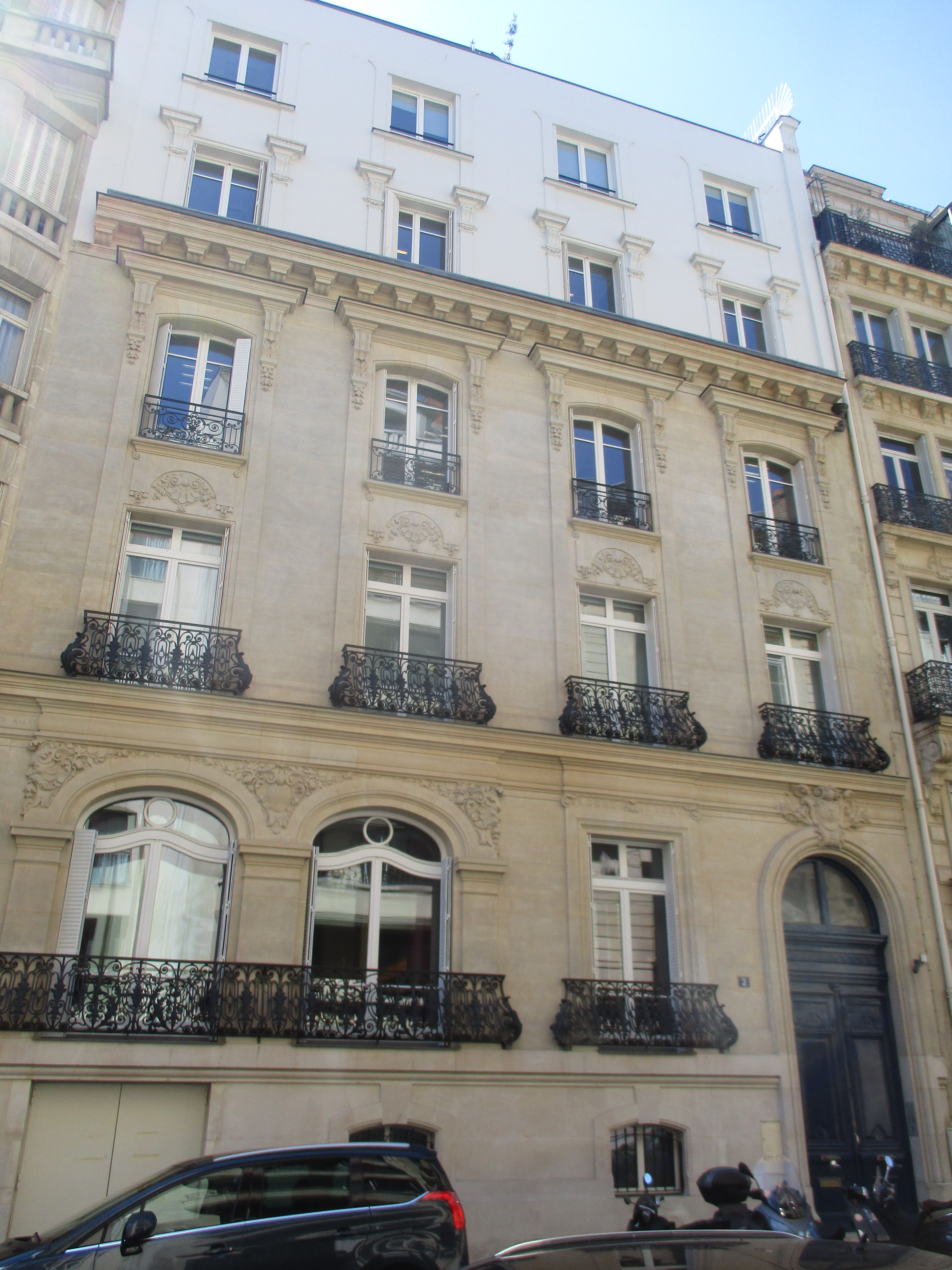 3 rue Clément-Marot, Paris VIIIe, ancien hôtel particulier de la comtesse de Casa-Miranda (ancien soprano Christine Nilsson, 1843-1921).